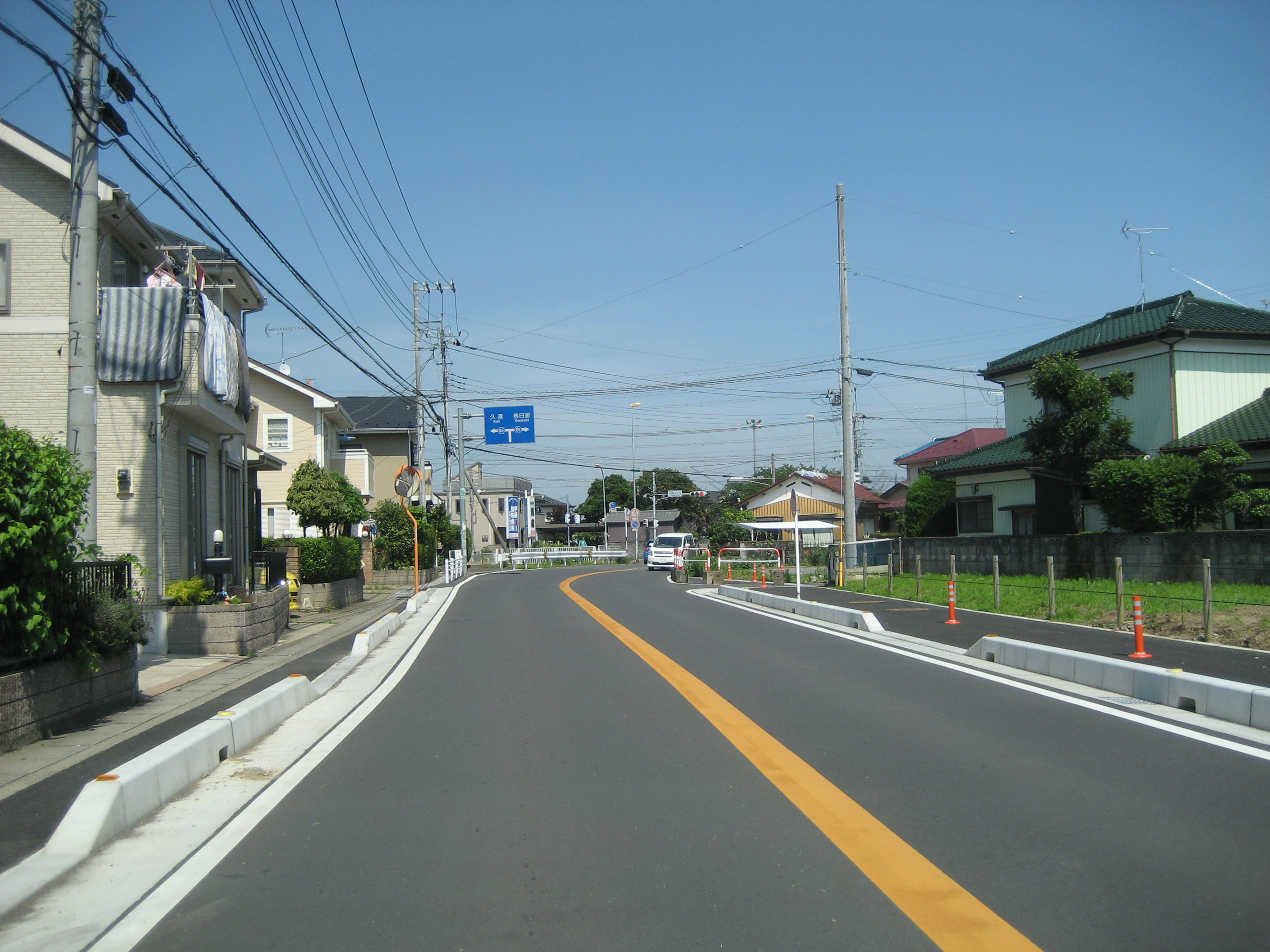 埼玉県道４０6号線宮代町内川端4丁目交差点付近を撮影